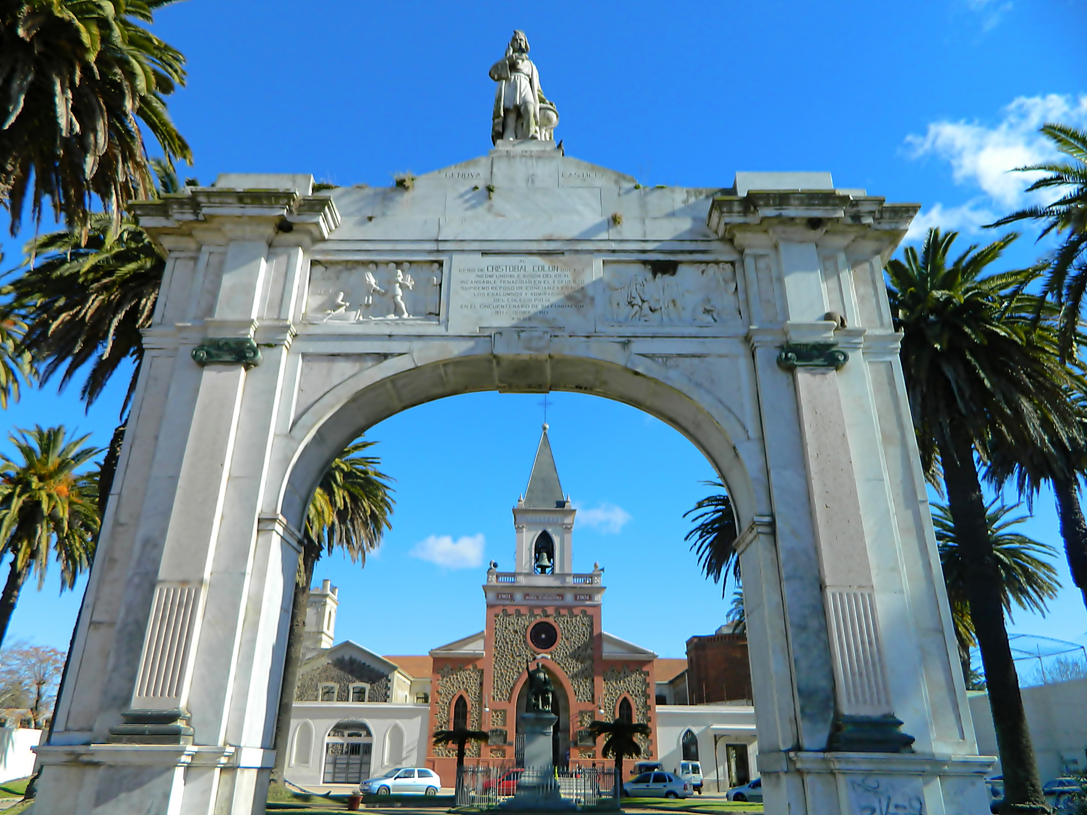 Colegio Pío. Ubicada en el departamento de Montevideo